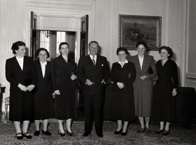 Tito sa ženama narodnim herojima iz Srbije i Makedonije